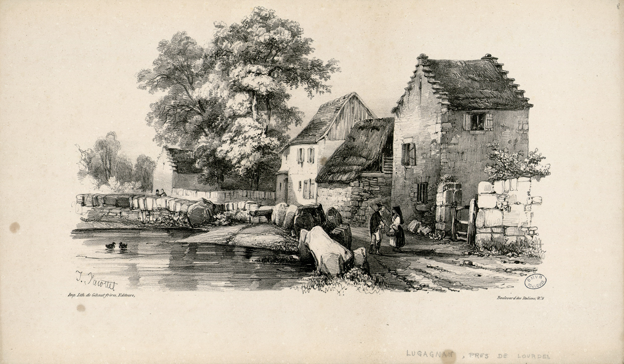 Pl. non légendées dans le texte, mais notes ms. : hypothèse de localisation Ancely, René (1876 - 1966). Possesseur